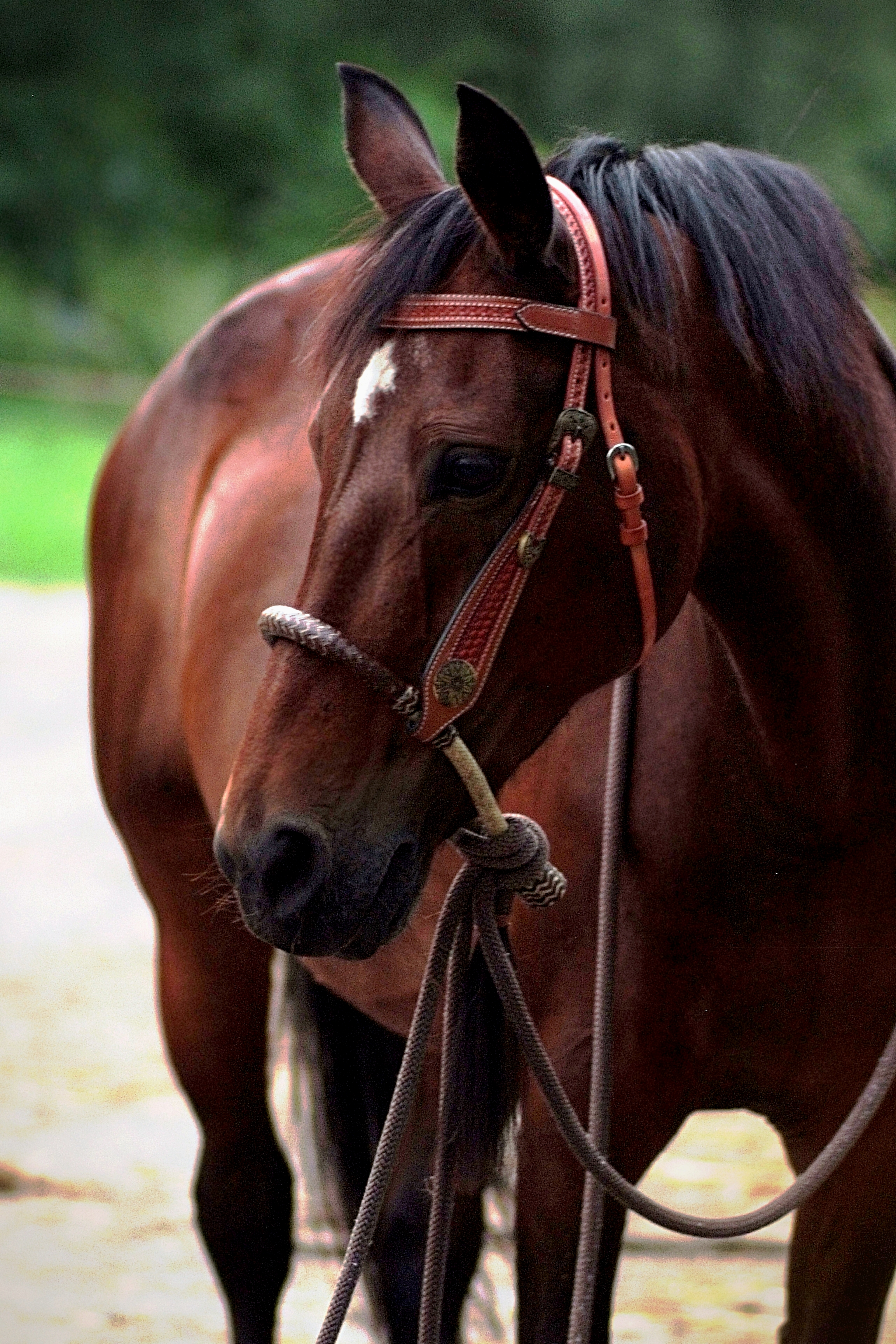 Bosal